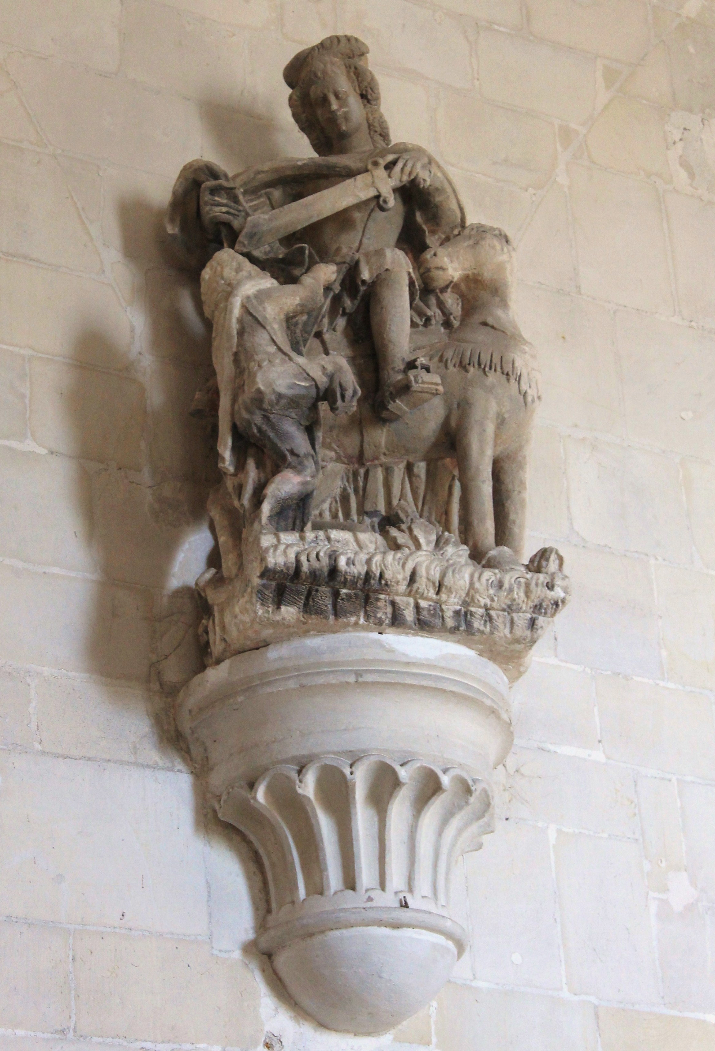 Statue équestre de Saint-Martin du XVIe placée à l'intérieur de l'église Saint-Martin de Colombelles (Calvados) Base Mémoire